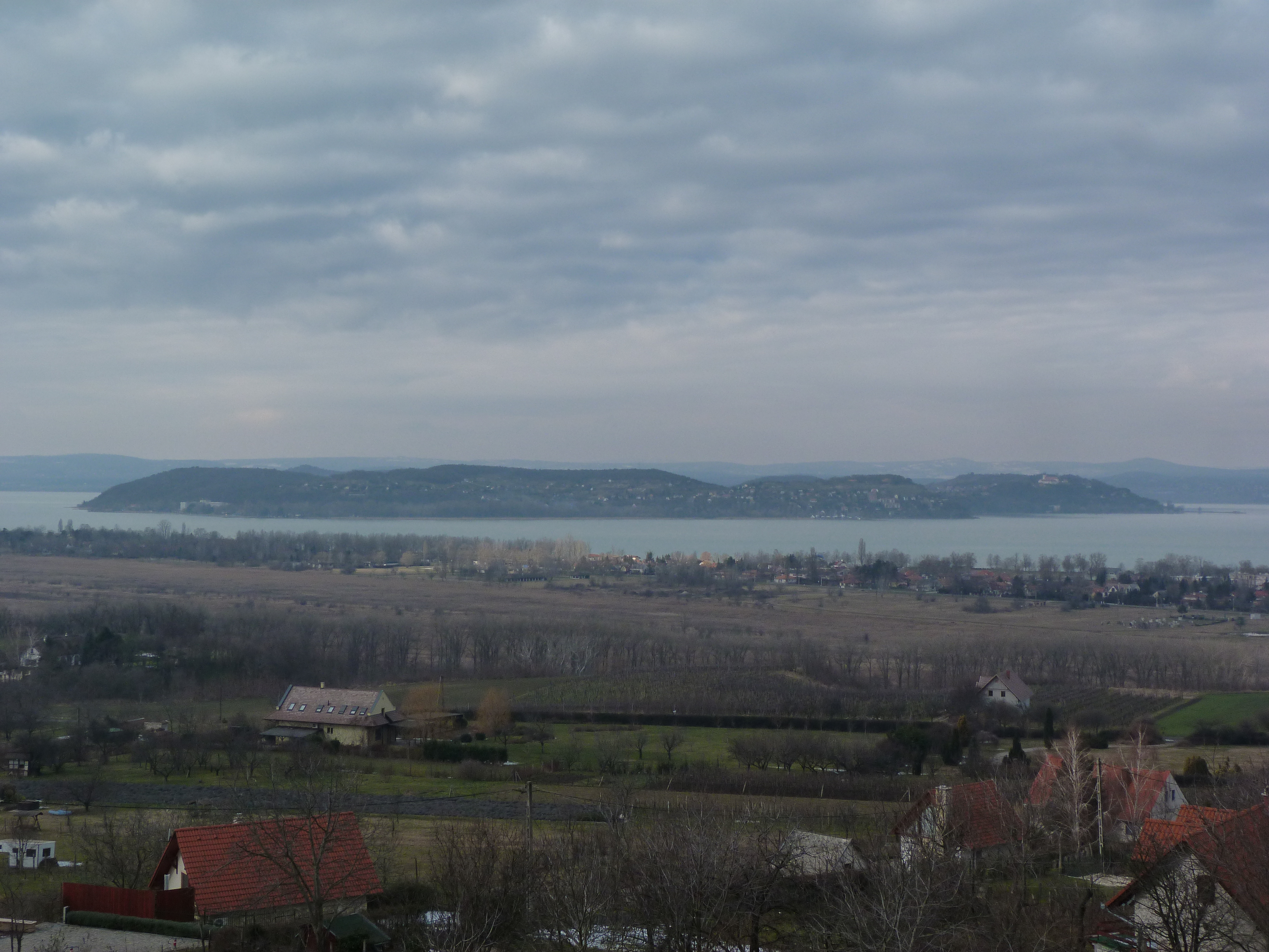 Zamárdi Kő hegy. Kilátás - Tihany felé.